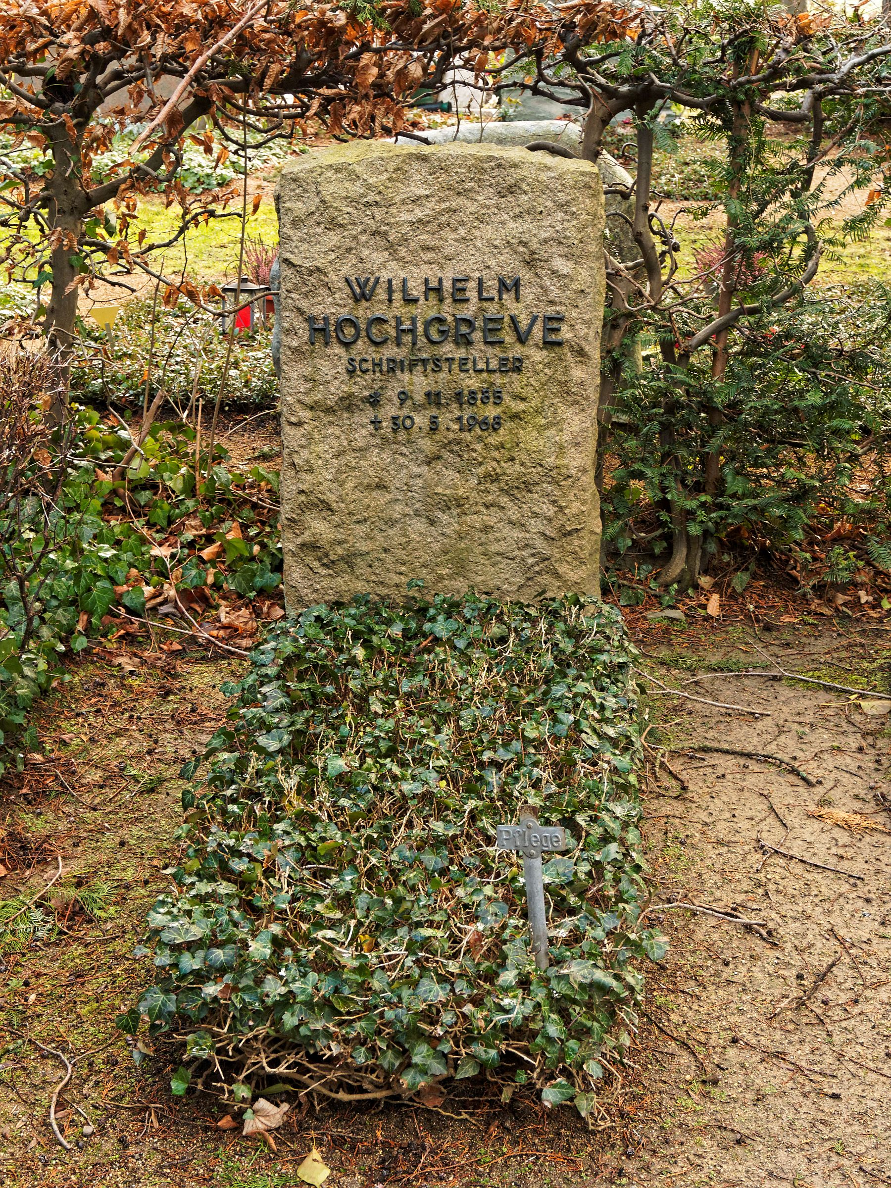 Grab von Wilhelm Hochgreve auf den Alten Friedhof in Goslar